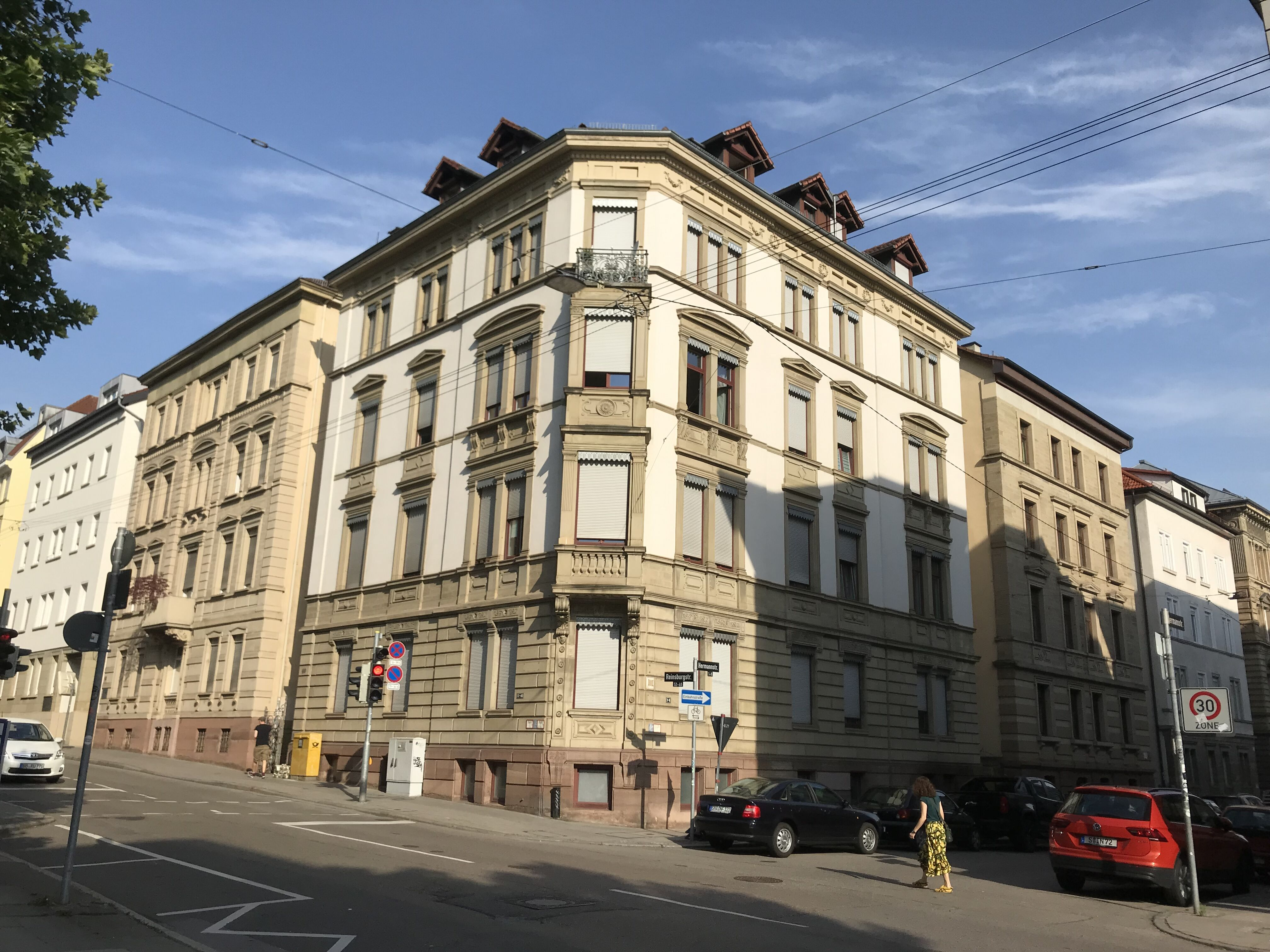 Typisches Bürgerhaus in der Reinsburgerstraße